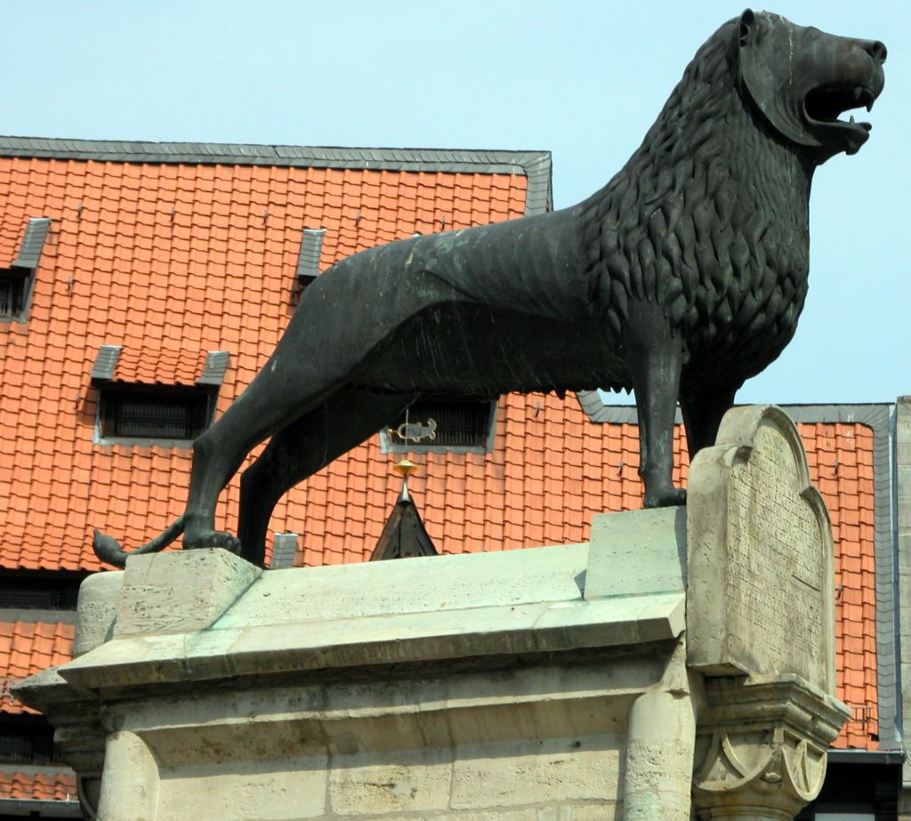 Braunschweig: Braunschweiger Löwe von Süden